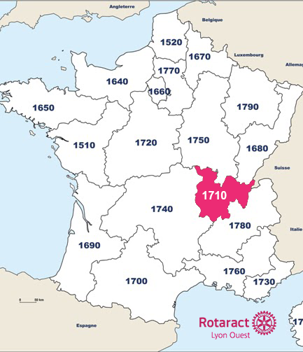 Rotaract District Lyon Ouest 1710